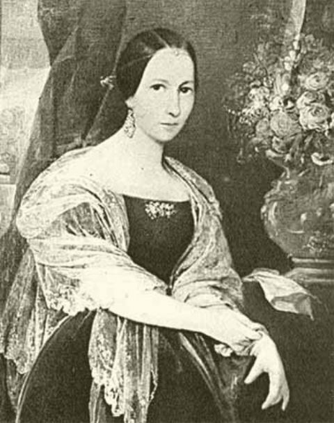 Reproducción en blanco y negro del retrato de Enriqueta Pinto Garmendia de Bulnes (1815-1904), esposa del presidente Manuel Bulnes